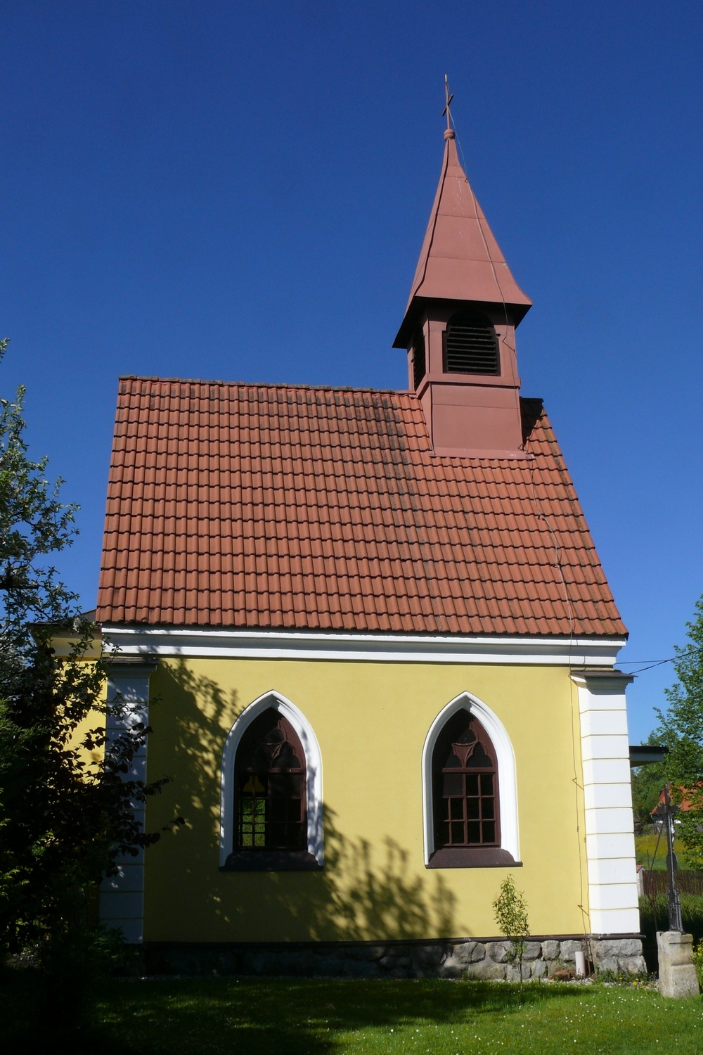 Kramolín